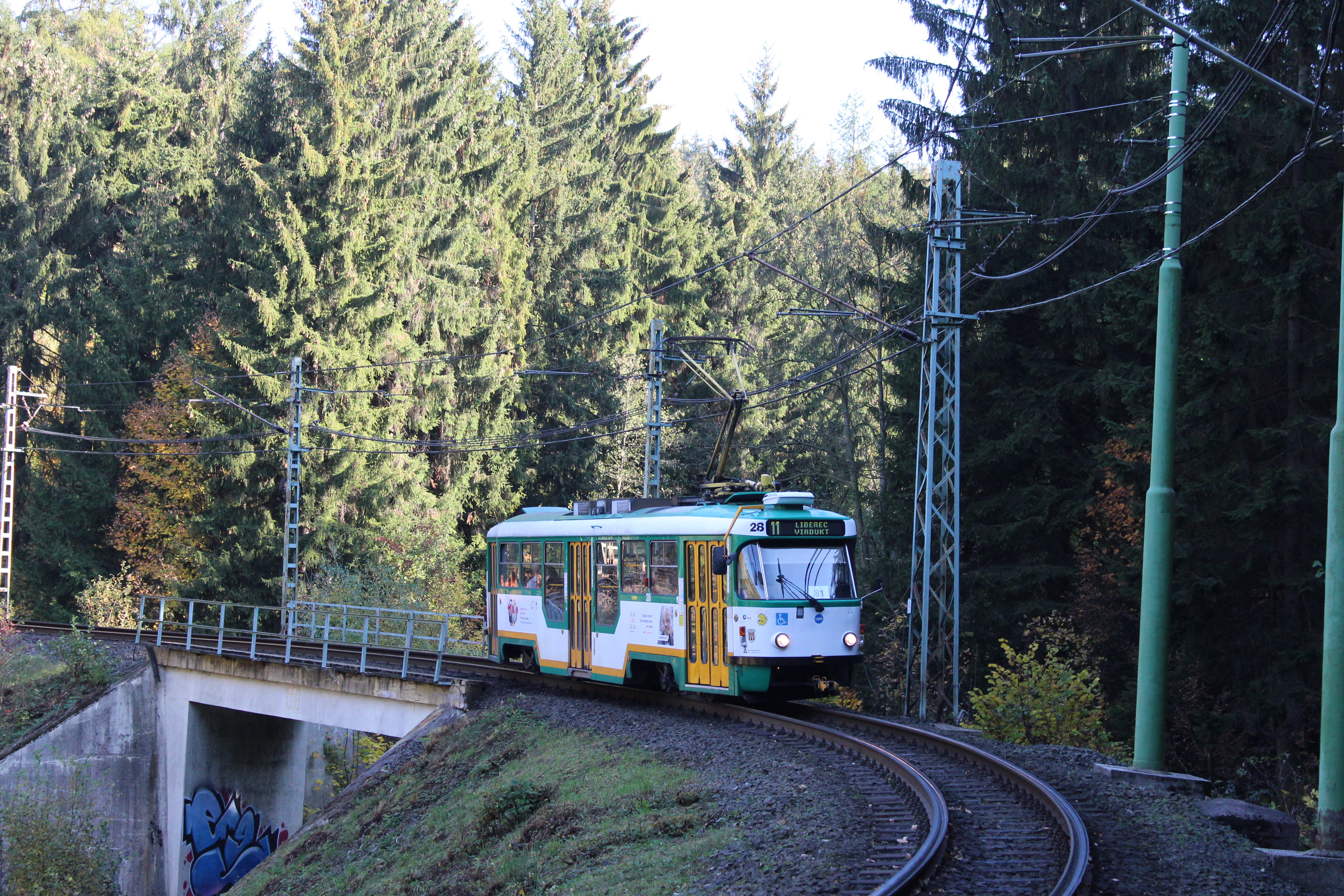 Liberecká tramvaj Tatra T3R.PLF ev. č. 28 v jabloneckém Zeleném Údolí